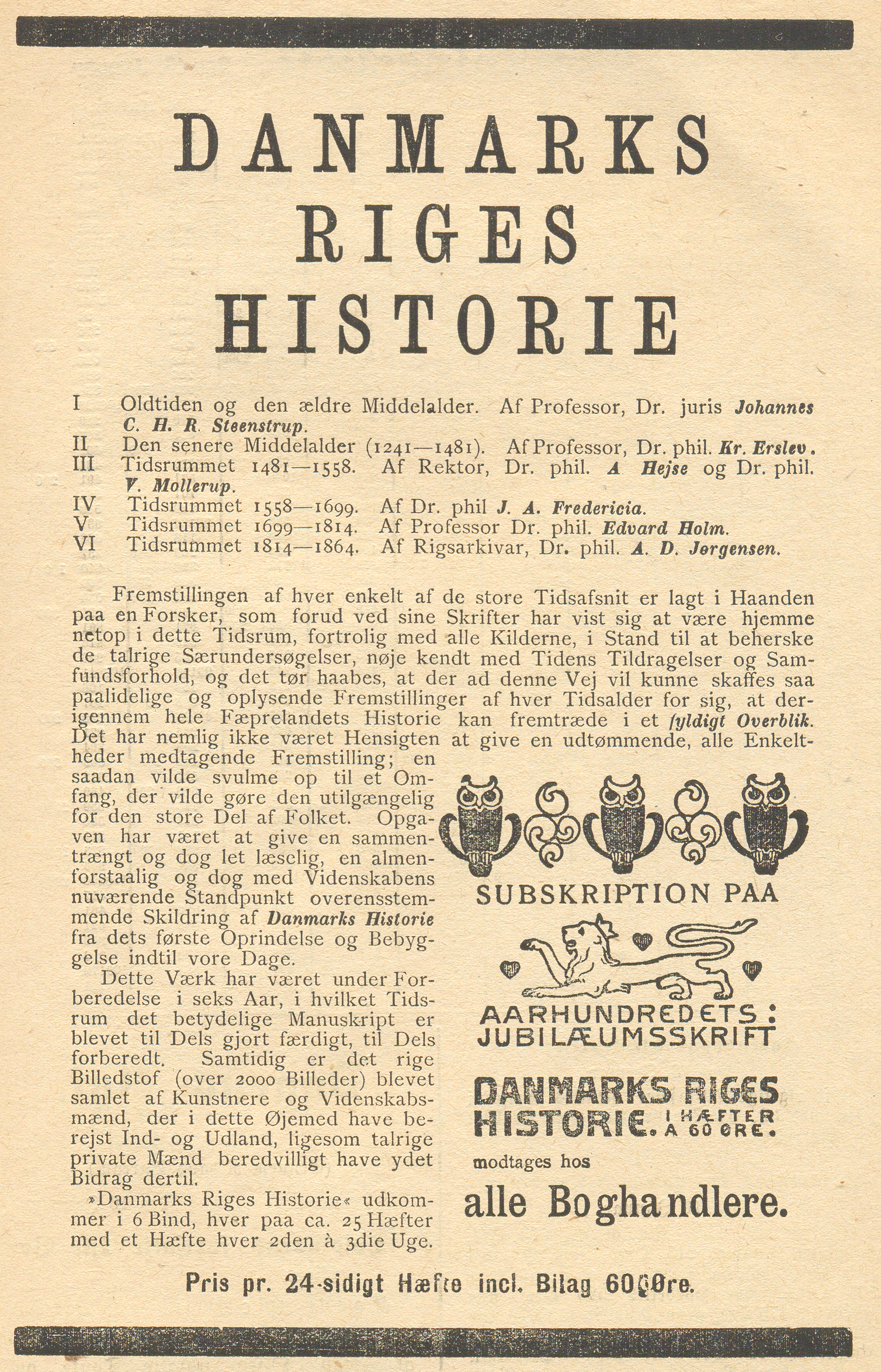 Avisannonce for værket Danmarks Riges Historie fra Sorø Avis, januar 1897.